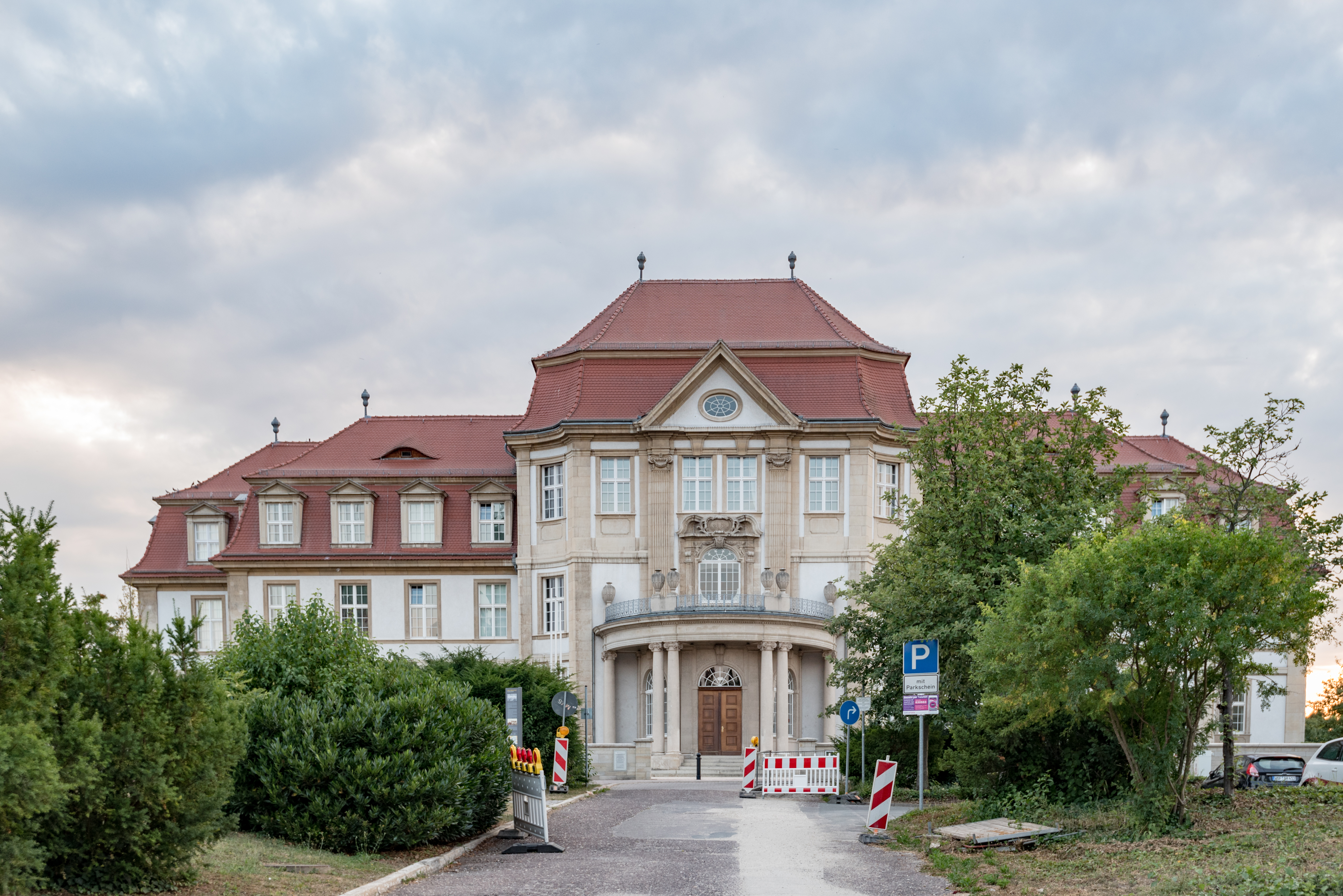 Naumburg (Saale), Domplatz 10